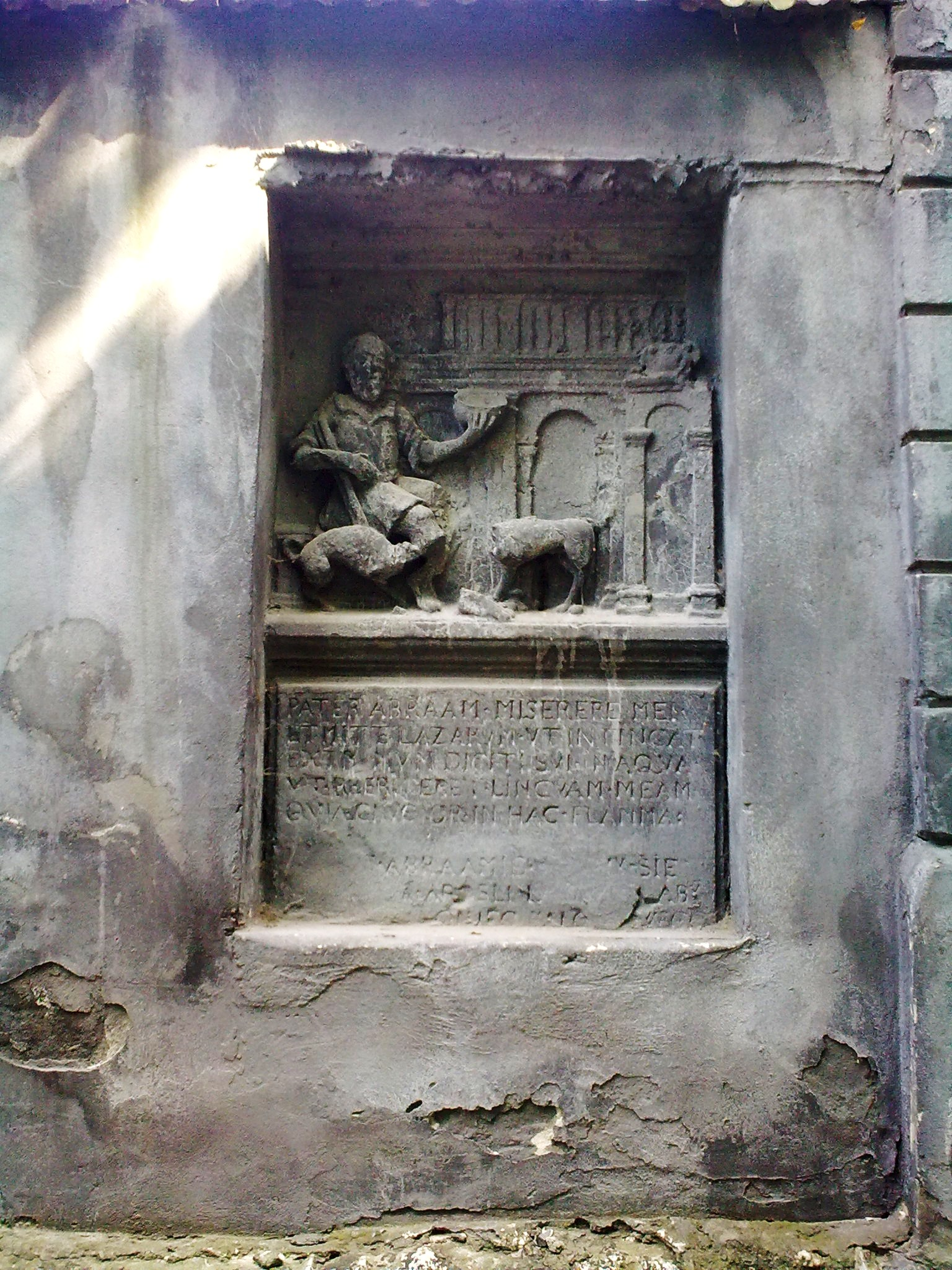 Płaskorzeźba w murze Szpitala Łazarza